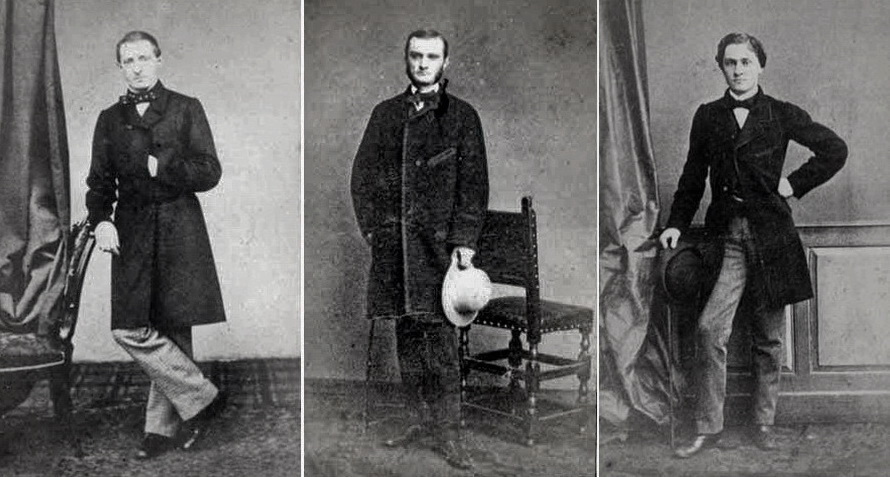 Portretfoto's van Edouard, Louis en Gustave Regout, drie van de vijf zonen van de Maastrichtse ondernemer Petrus Regout.